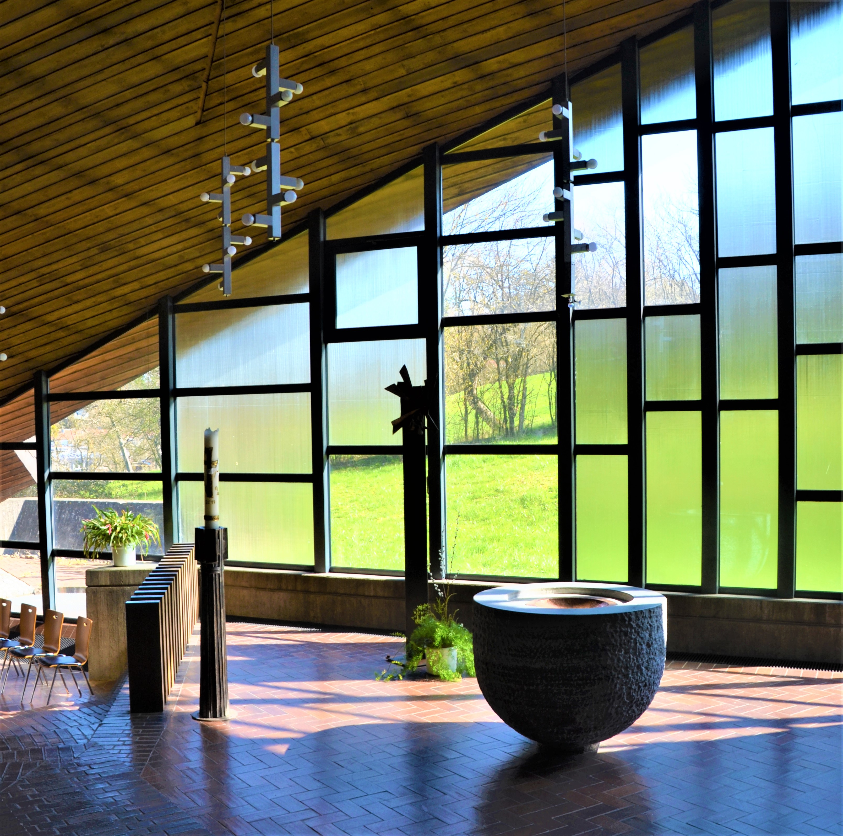 Taufbecken in St. Michael in Schwäbisch Gmünd